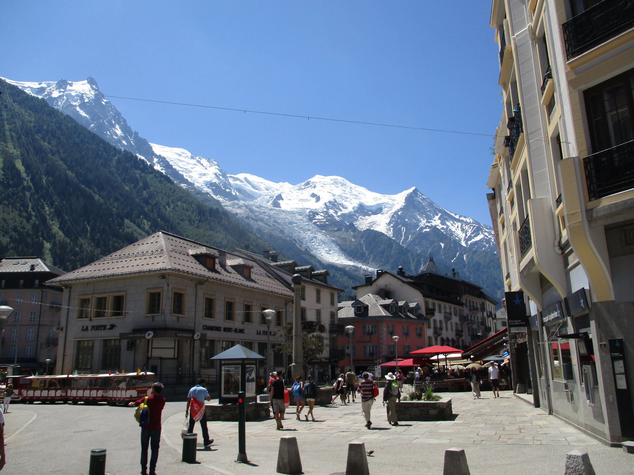 Streets in Chamonix & Mont Blanc from Chamonix